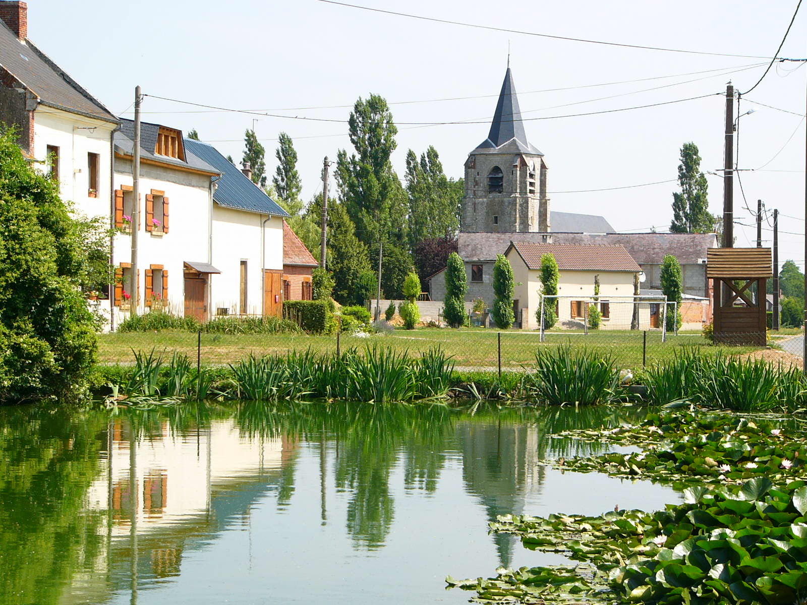 LAVACQUERIE : Vue de la mare de la rue principale, vers l'église